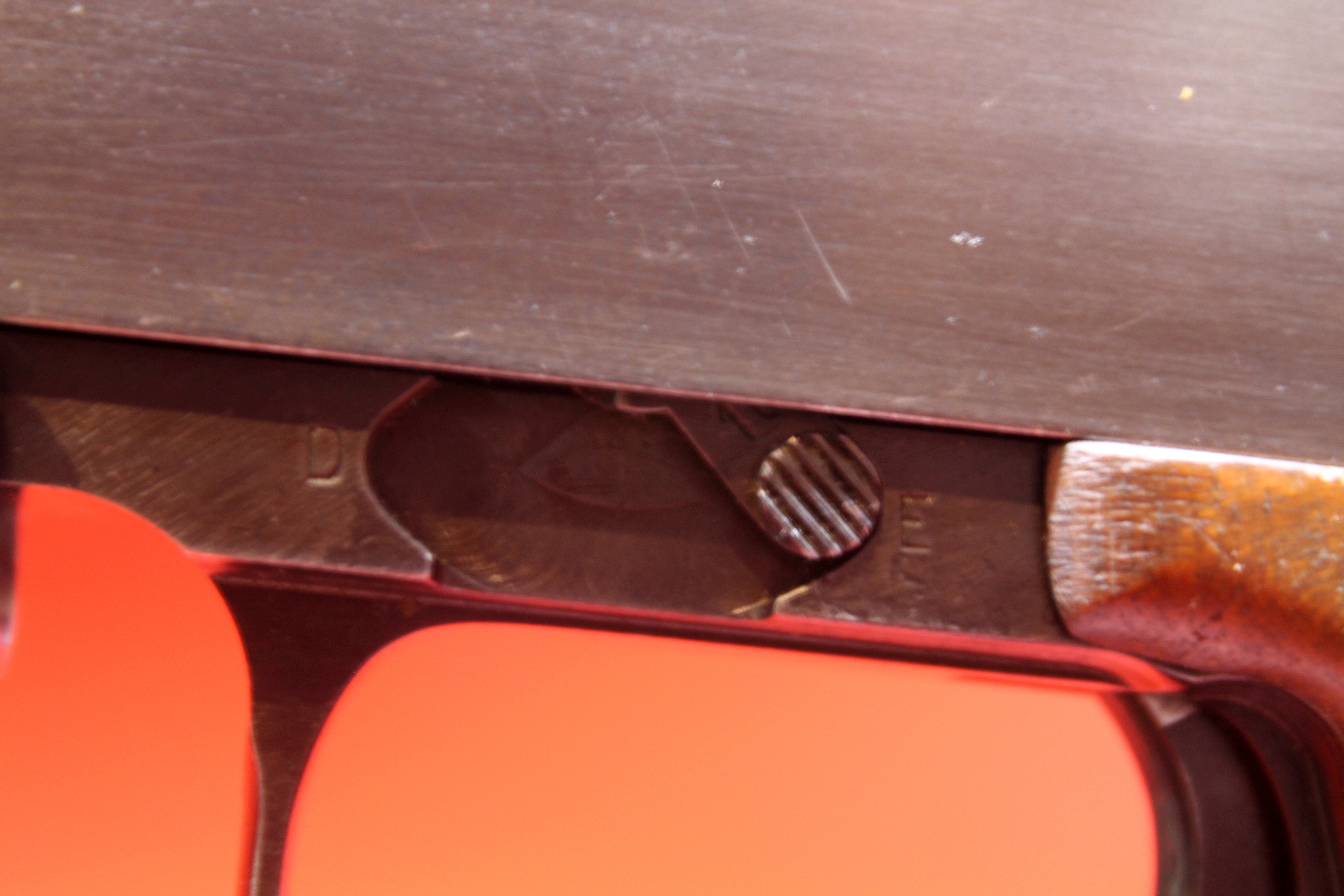 Maschinenpistole IX. Parteitag im Waffenmuseum Suhl, Detail Feuerwahlhebel. D: Dauerfeuer, E: Einzelfeuer.